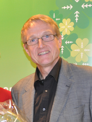 Liv Signe og Ivar Egeberg